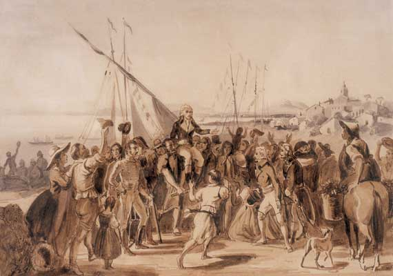 Francisco de Miranda, en su llegada a La Guaira el 10 de diciembre de 1810, es recibido con entusiasmo por la población, y por Bolívar.